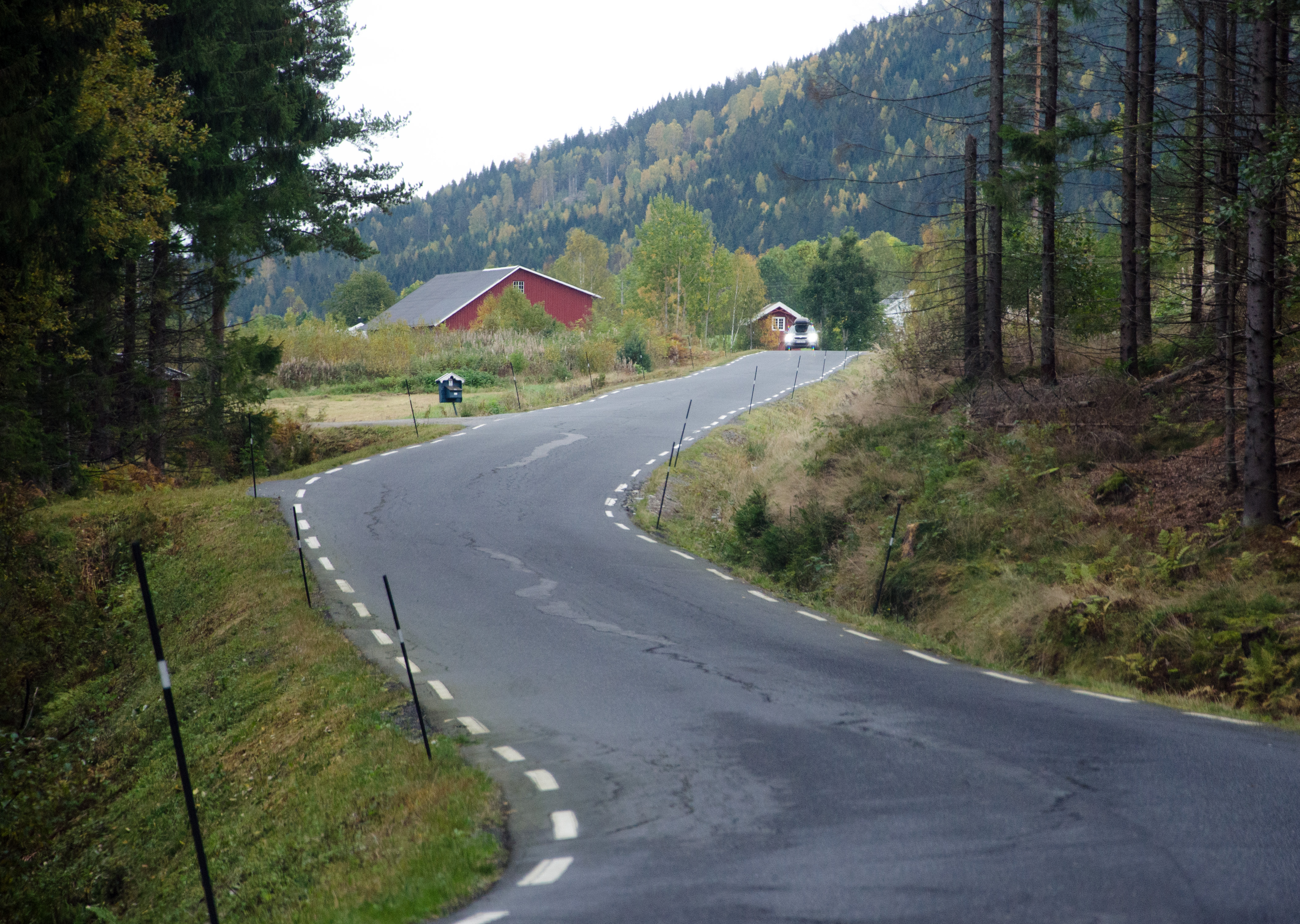 Fylkesvei 81 i Kongsberg